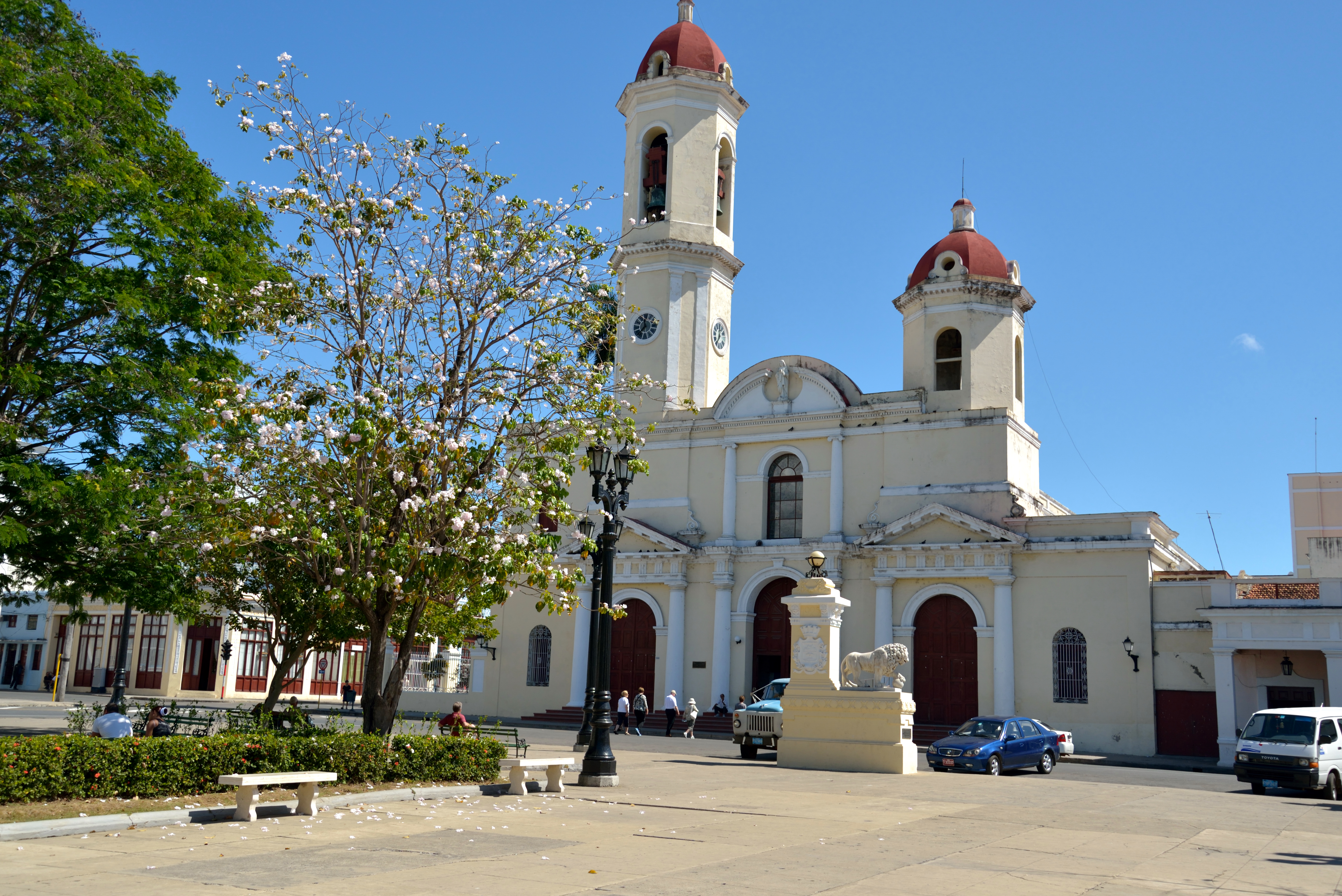 La cathédrale de Cienfuegos.